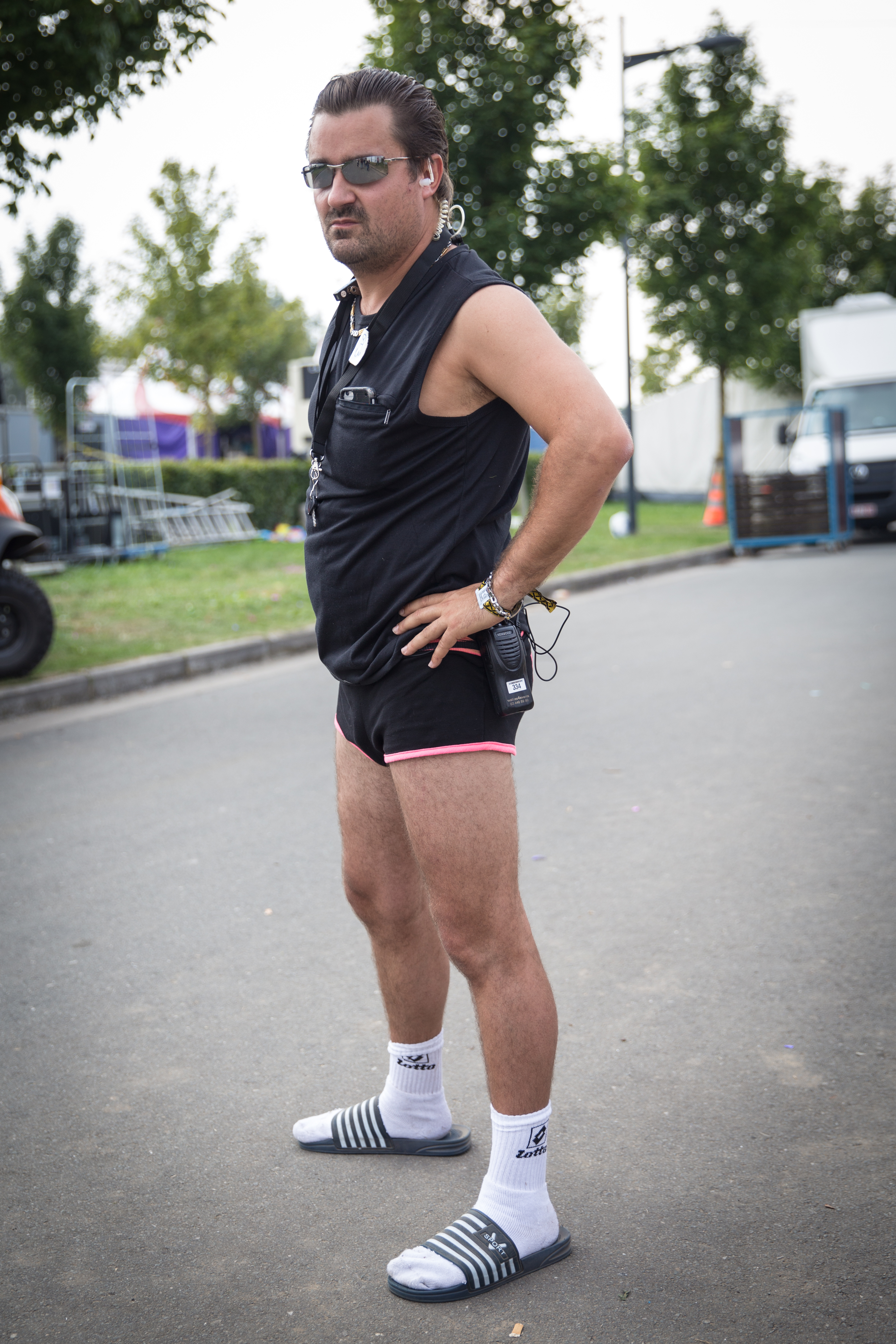 Johnny Overdrive (pseudoniem van John Noseda), een van de organisatoren van Kamping Kitsch Club